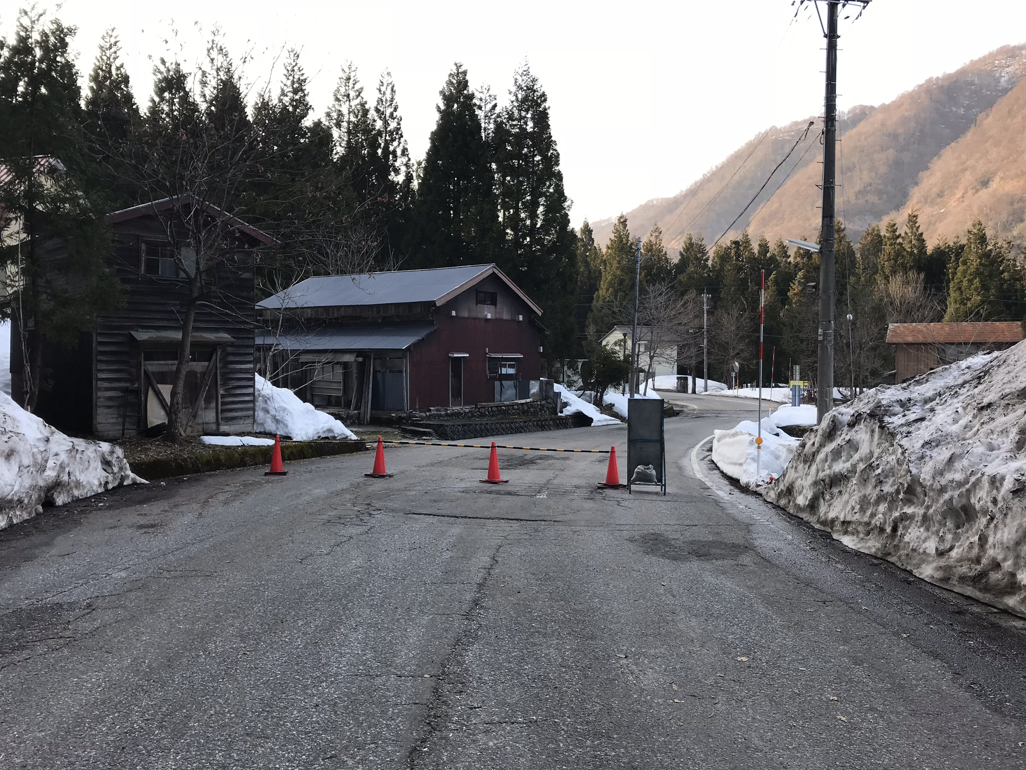 伊折集落の